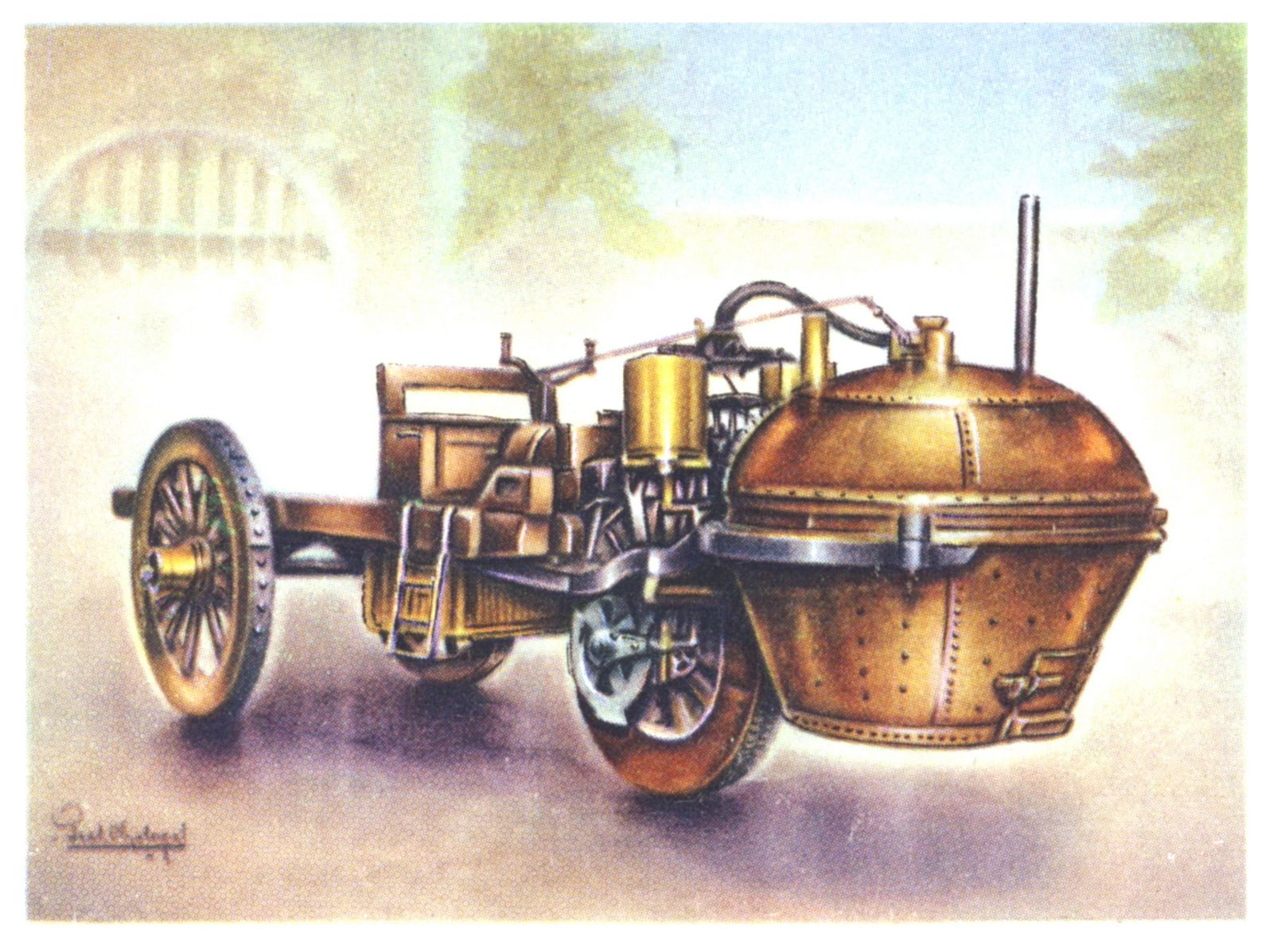 Primeros Automoviles